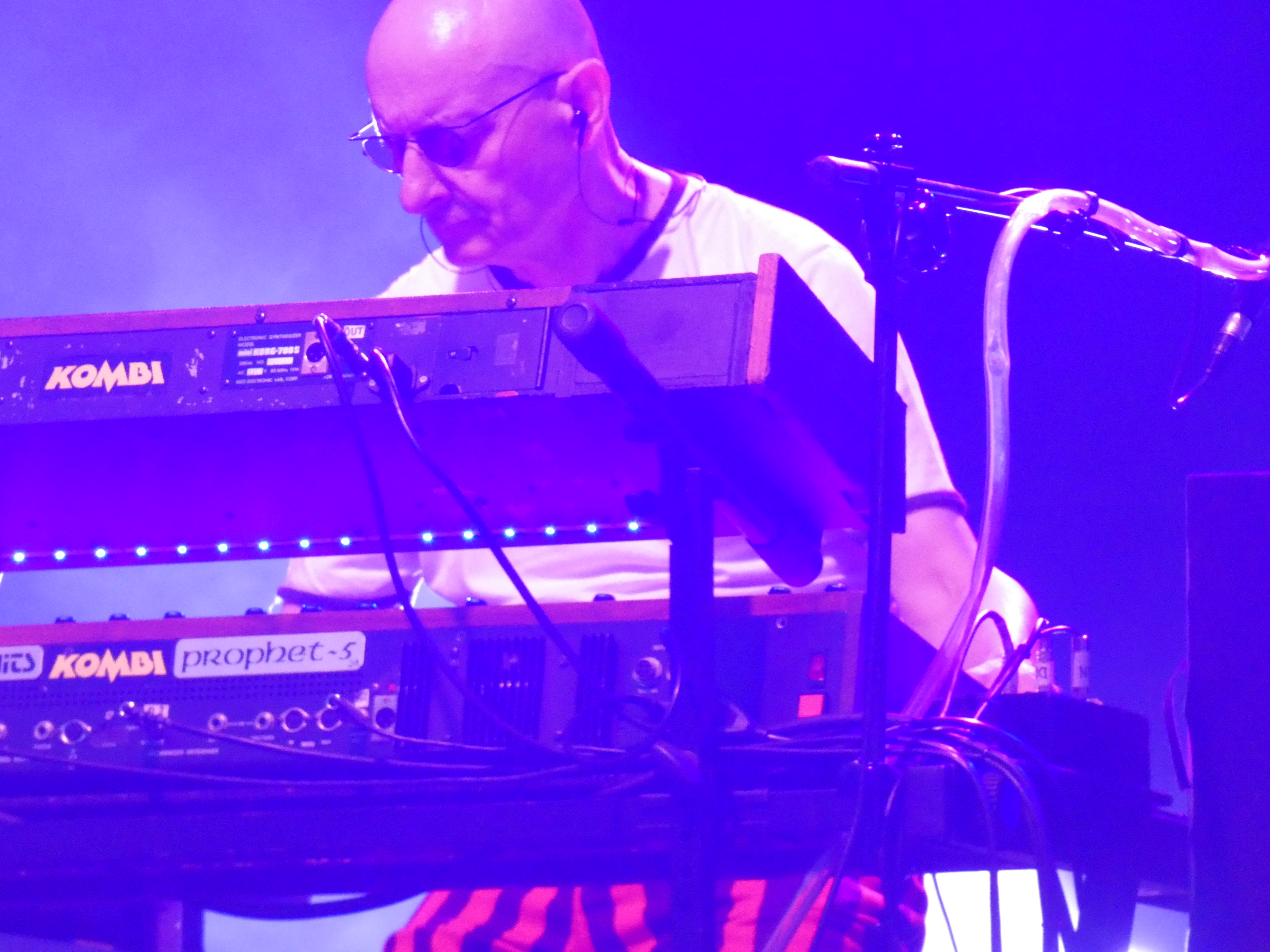 Sławomir Łosowski, Nowa Dęba 2019-06-16